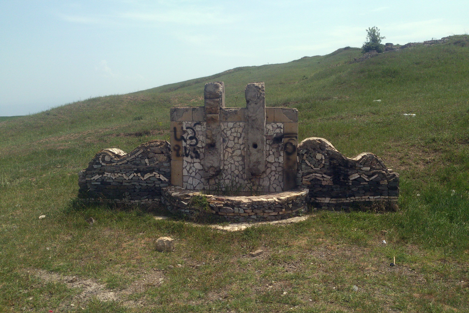 Artcakh, Sanasar (Kubatli), Memorial spring, 2014.05.09